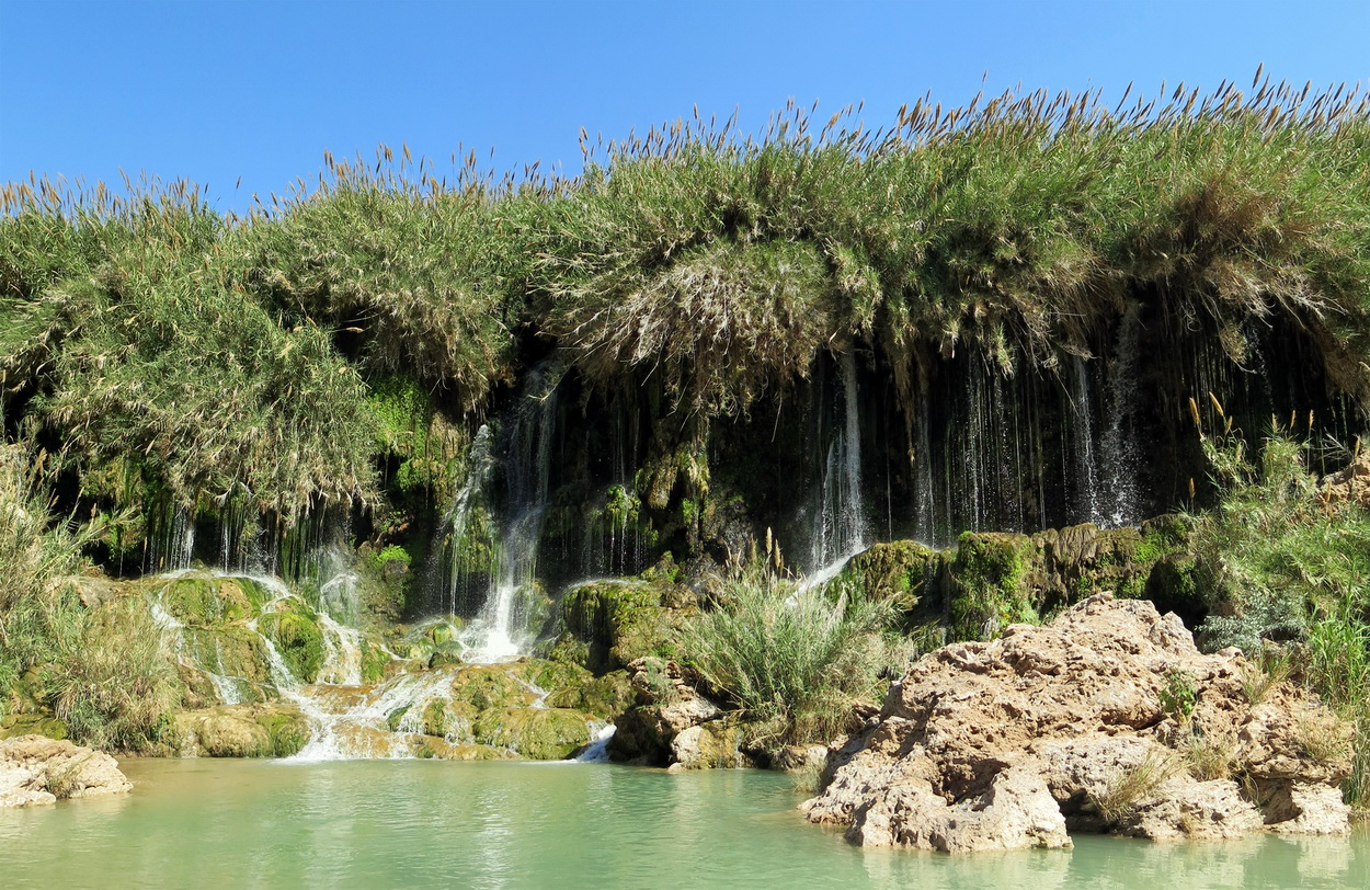 آبشار فدامی، بخش فورگ، شهرستان داراب، استان فارس